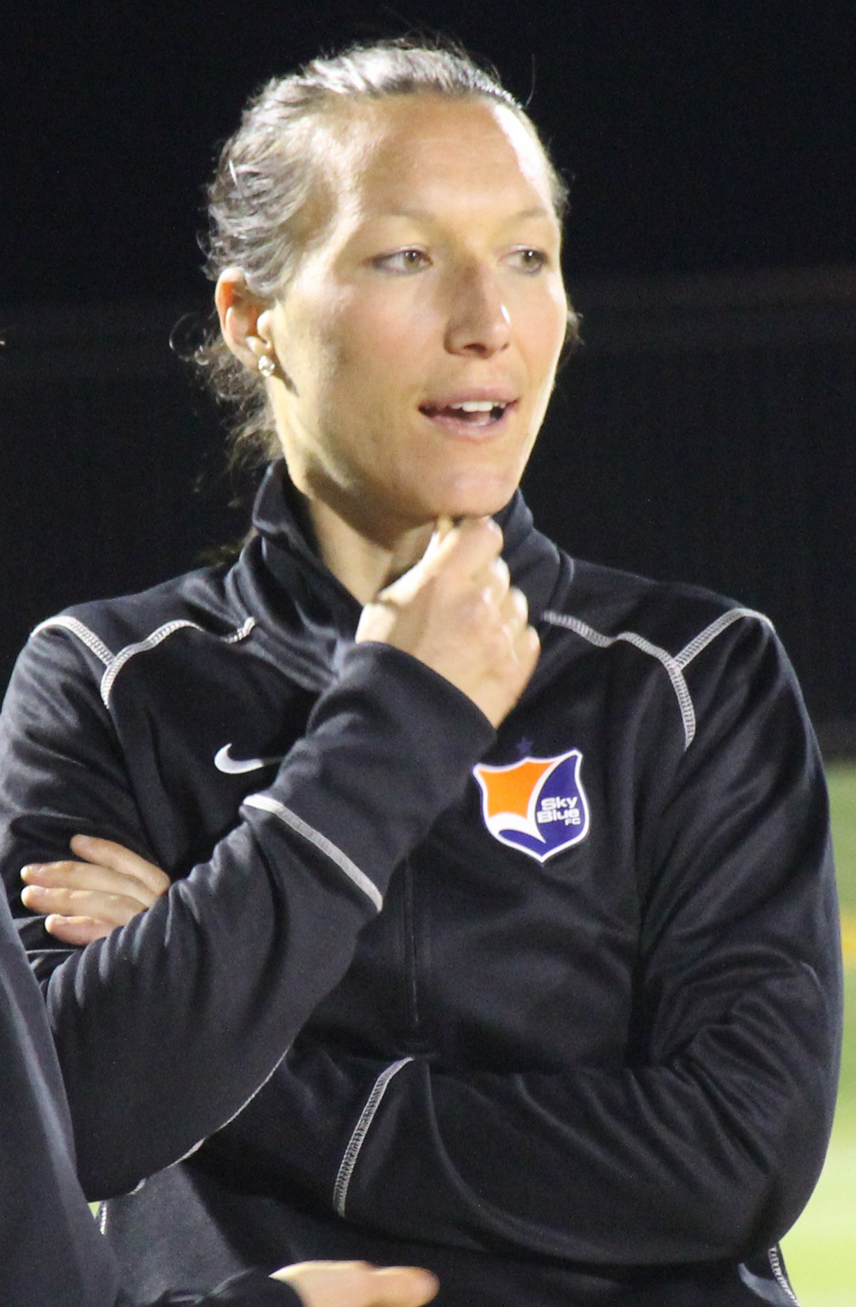 Jillian Loyden